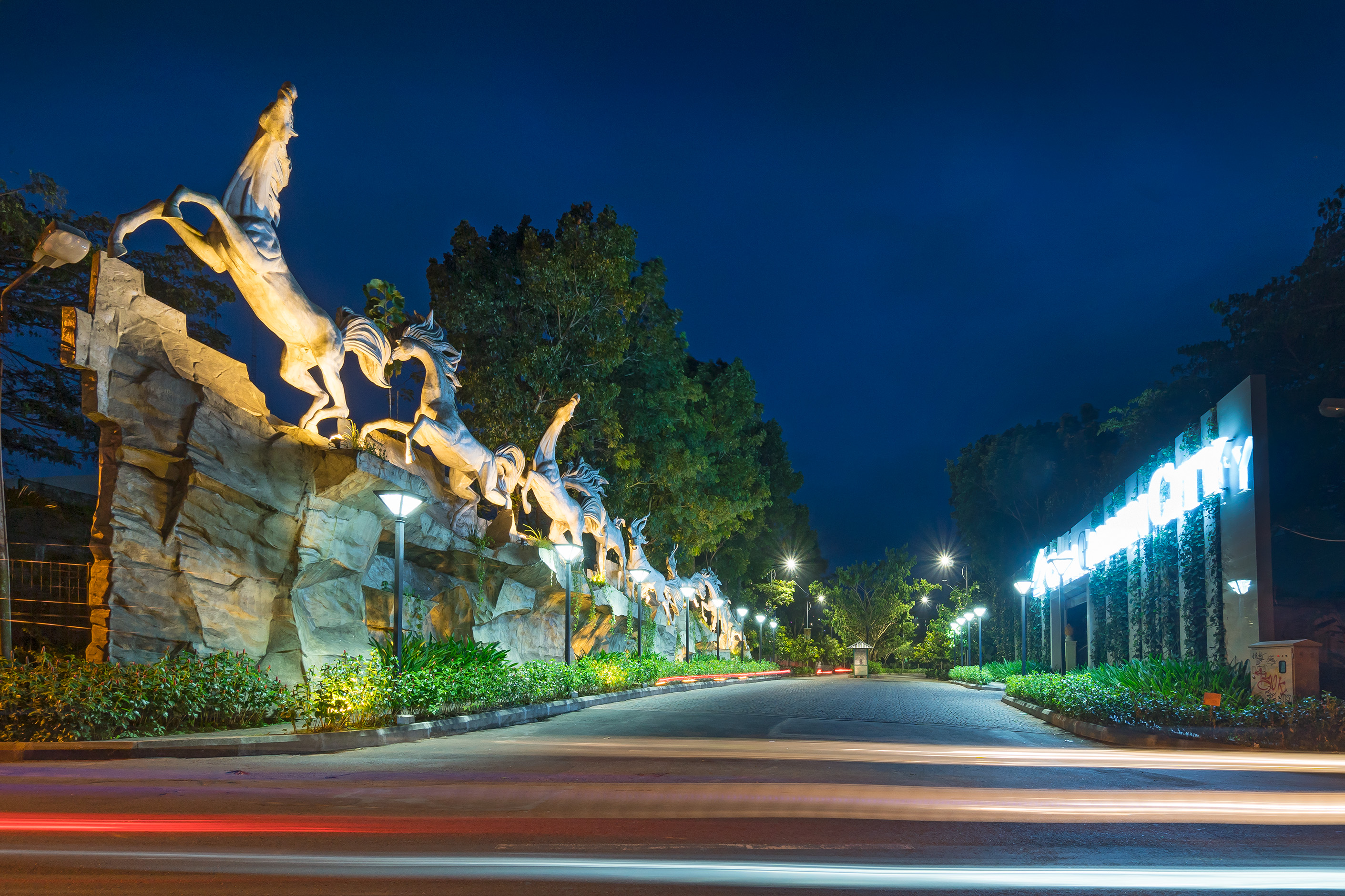 Pintu utama CitraGarden City Malang